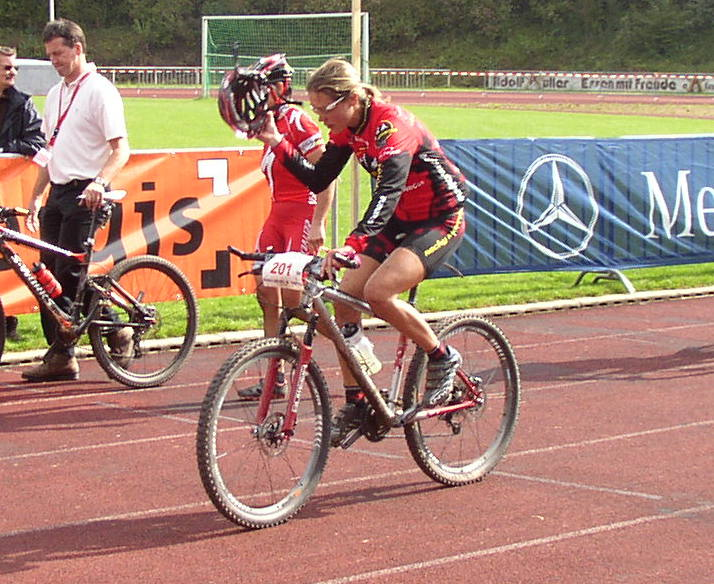 Pia Sundstedt beim Int. St. Wendeler MTB-Marathon